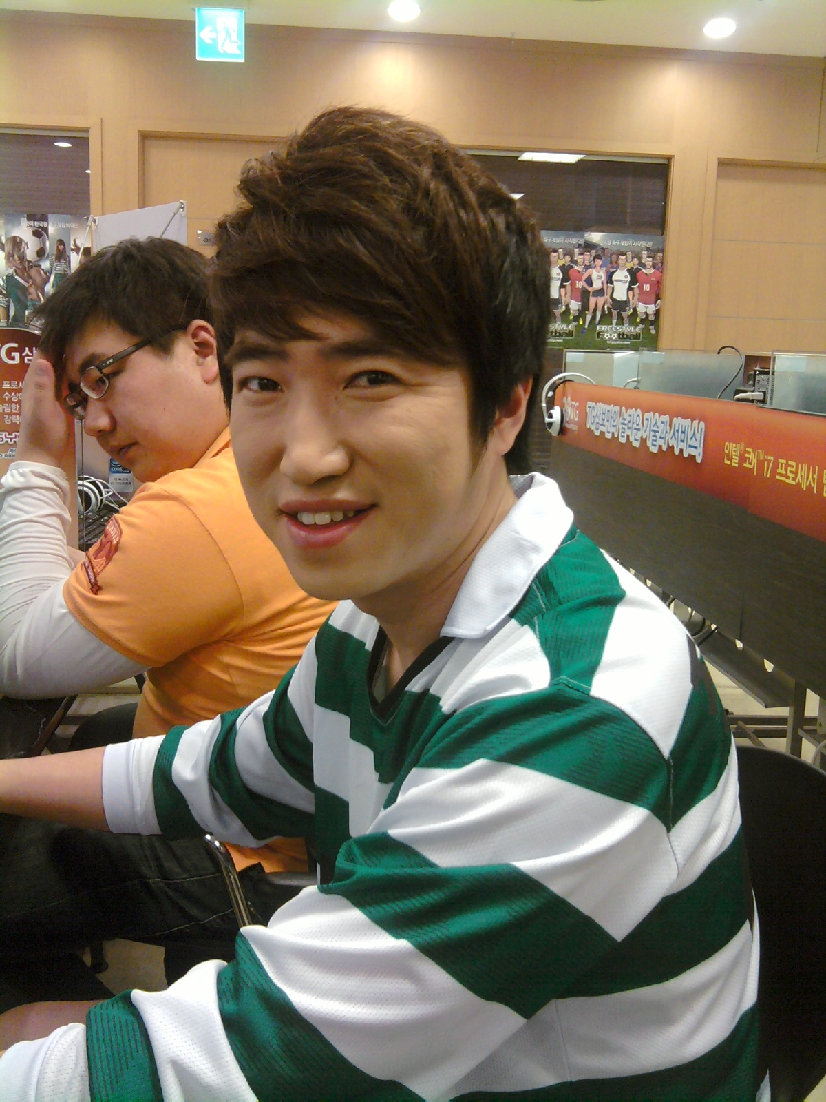 Korean comedian. jang dong min